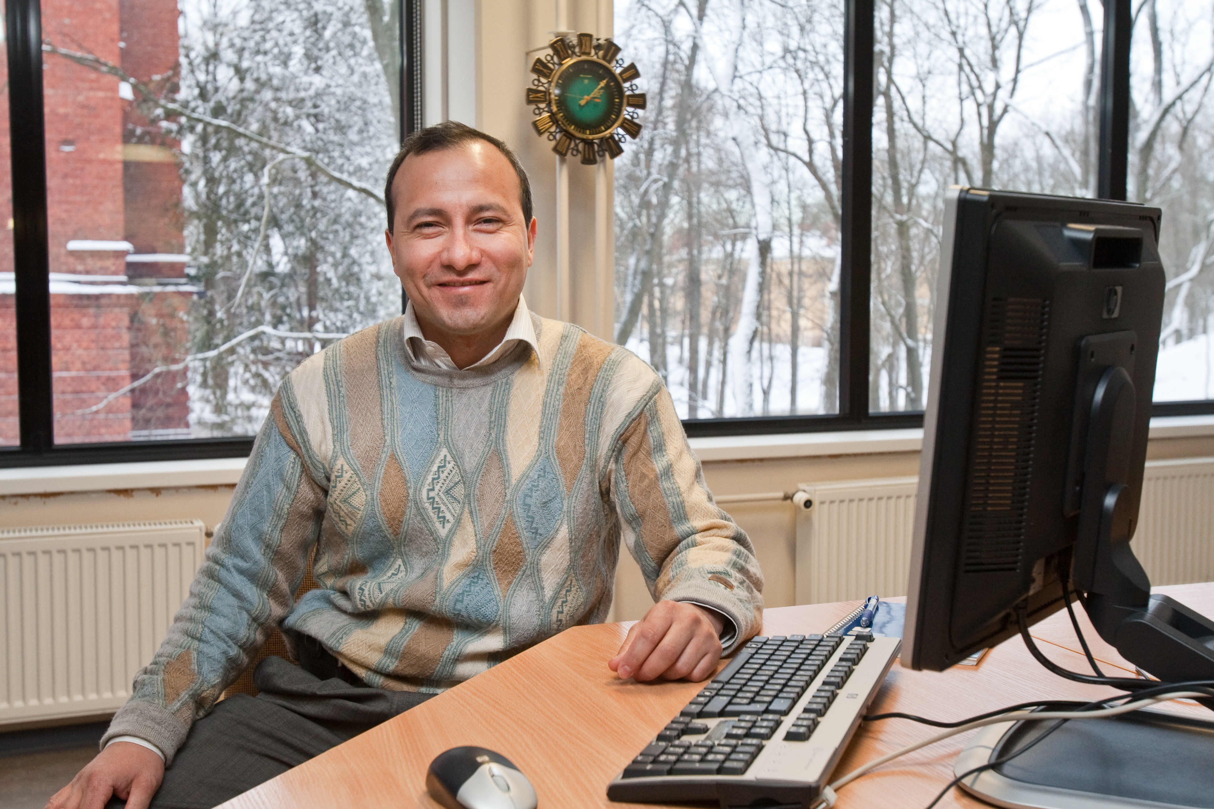 TÜ arvutiteaduste instituudi tarkvaratehnika professor Marlon Dumas.